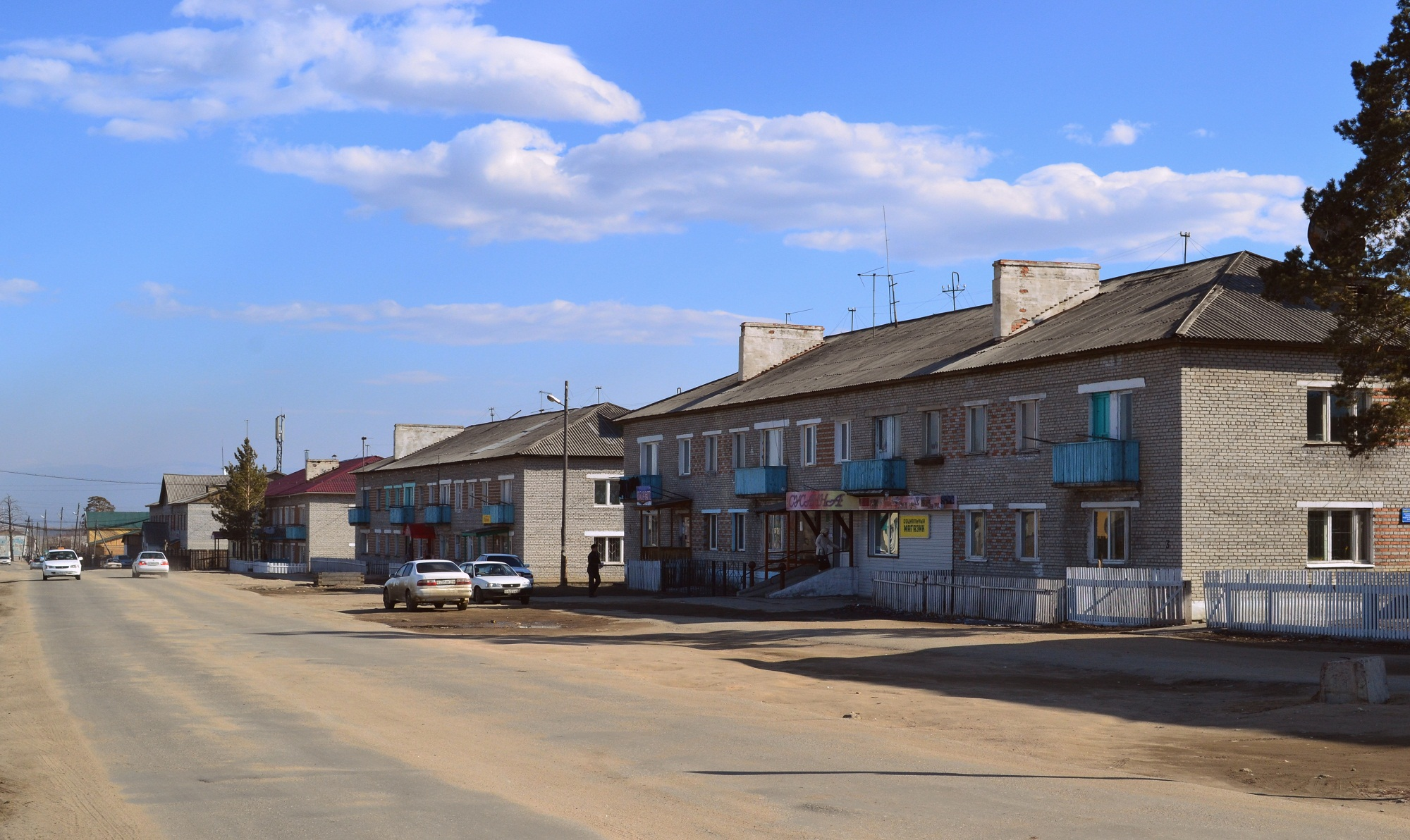 Одна из улиц в Курумкане. Курумканский район, Бурятия